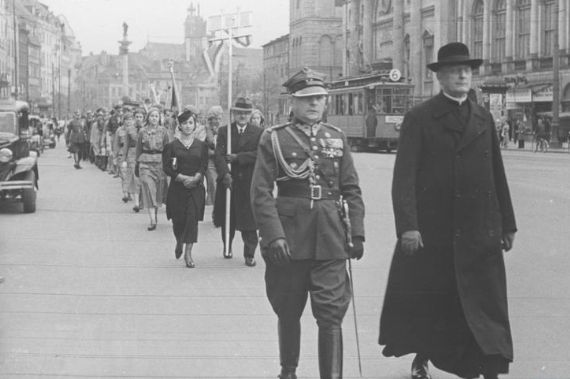 Uczestnicy zjazdu kół harcerskich z okresu zaborów w Warszawie w drodze do Belwederu. Na pierwszym planie wiceprzewodniczący ZHP ks. Jan Mauersberger.